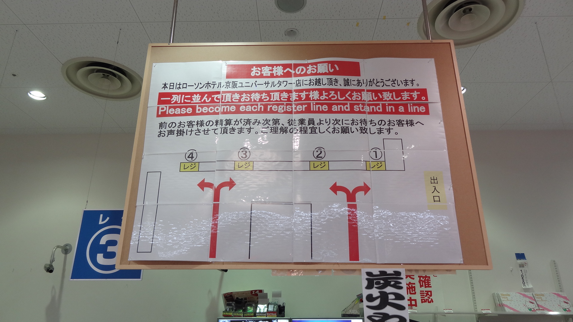 フォーク並びの2分割バージョン